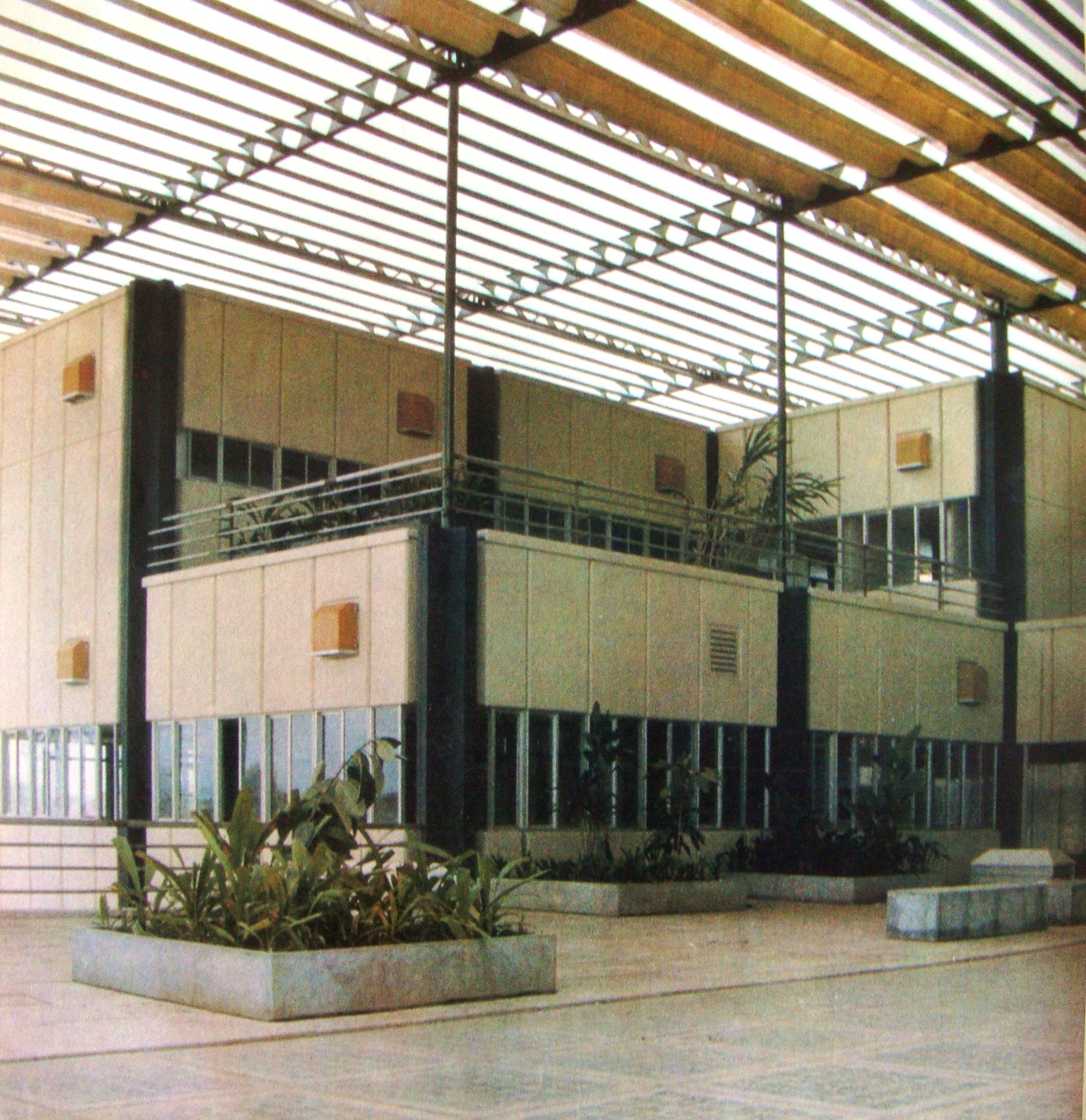 Terraza cubierta del Hospital San Vicente de Paul en Orán, Salta. Argentina.